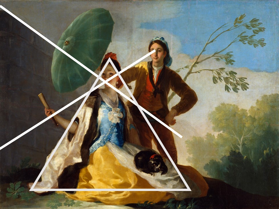 Liñas de forza da composicións de O parasol de Goya